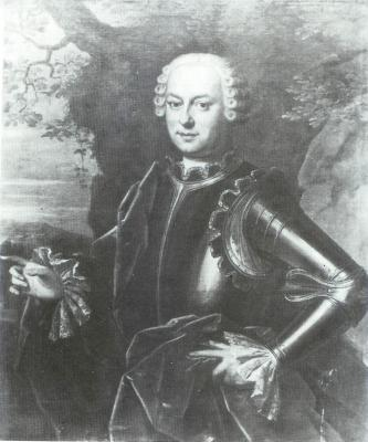 portrait du comte de Vorselaar